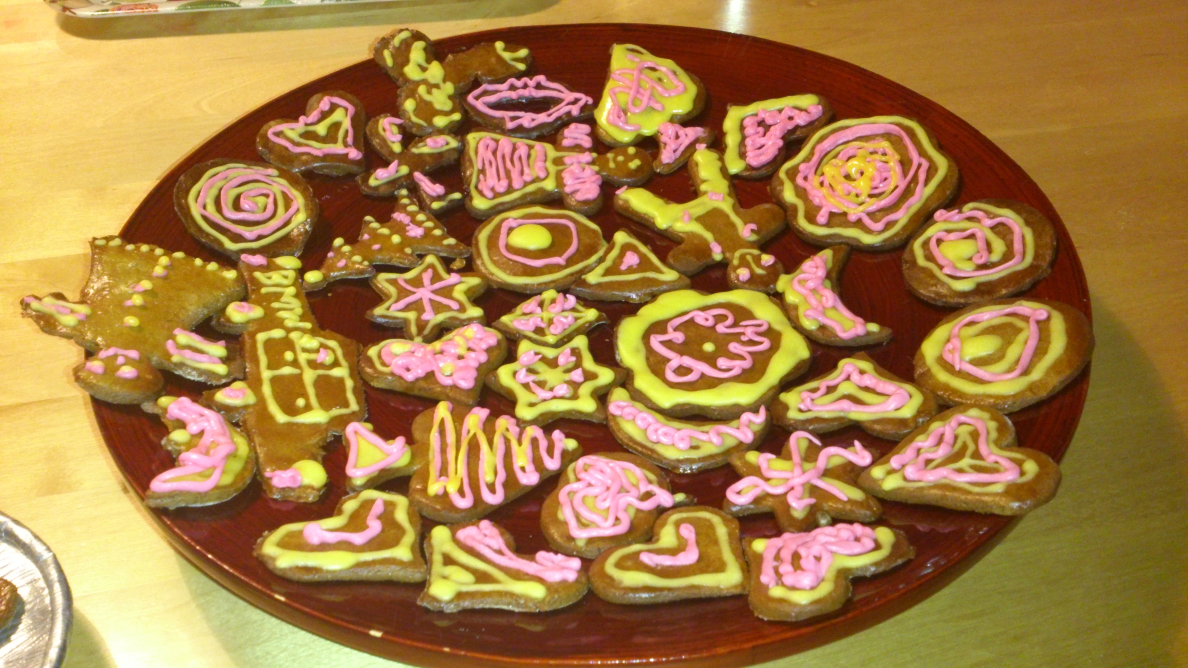 Glasuuritud piparkoogid